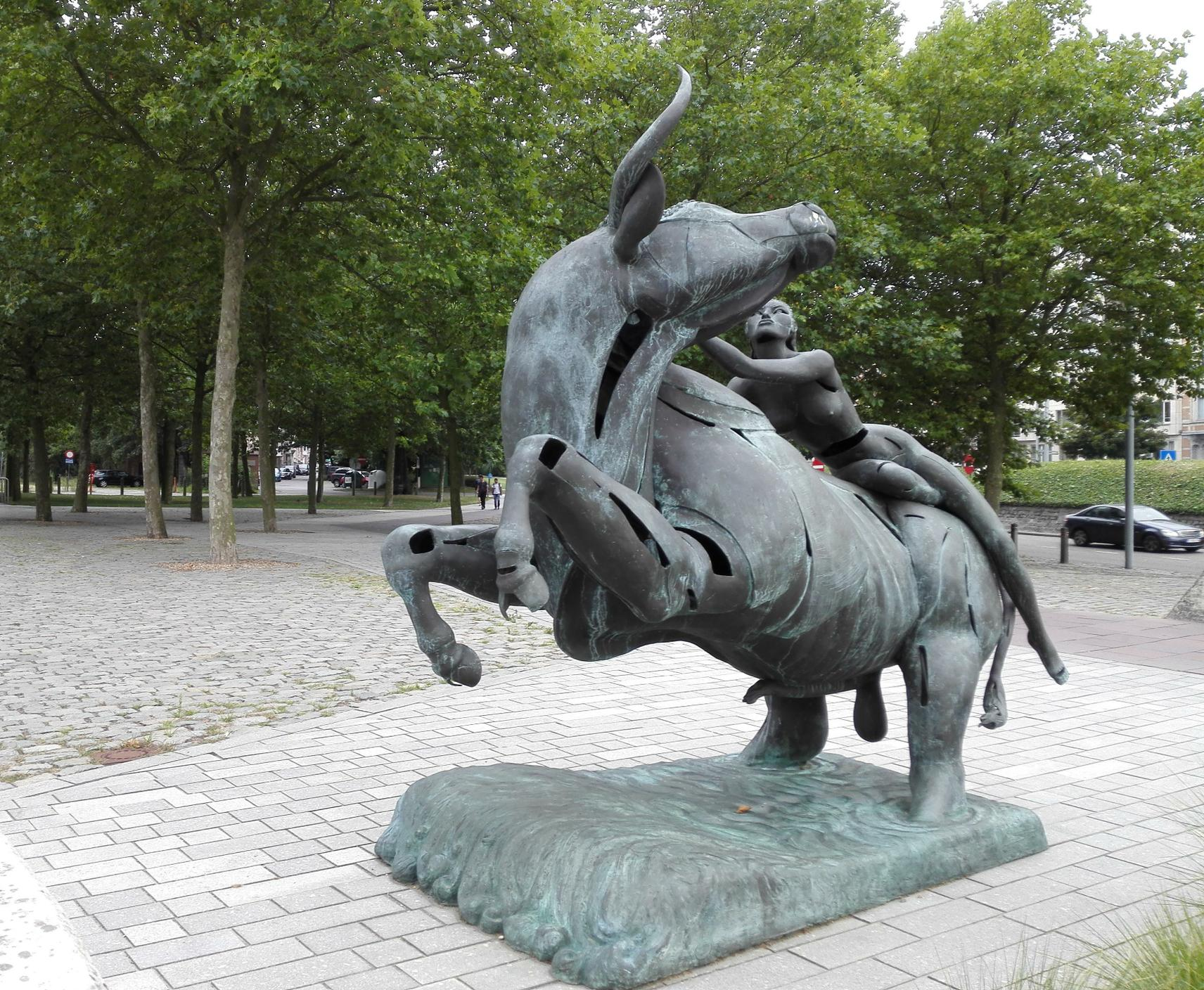 Leuven